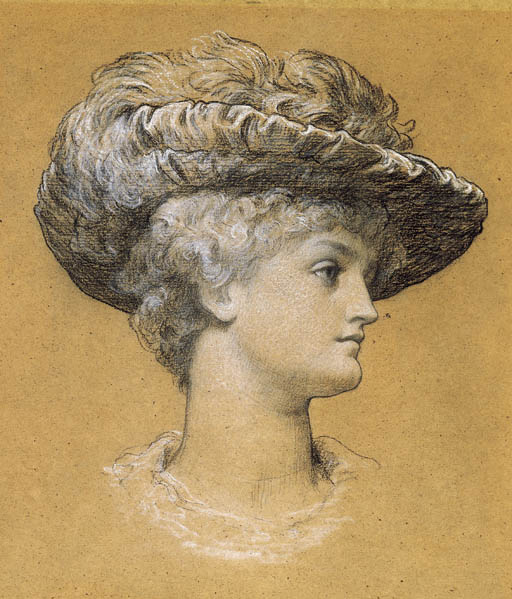 Frederic, Lord Leighton of Stretton, P.R.A., R.W.S. (1830-1896) . Portrait of Dorothy Dene; a study for 'Serenely Wandering in a Trance of Sober Thought' with inscription 'Zeichnung von/Sir Frederic Leighton/Widmung an Cecil van Haanen/1884' (on a label attached to the old backboard) black and white chalk on oatmeal paper 14¼ x 13 in. (36.3 x 33.2 cm.)